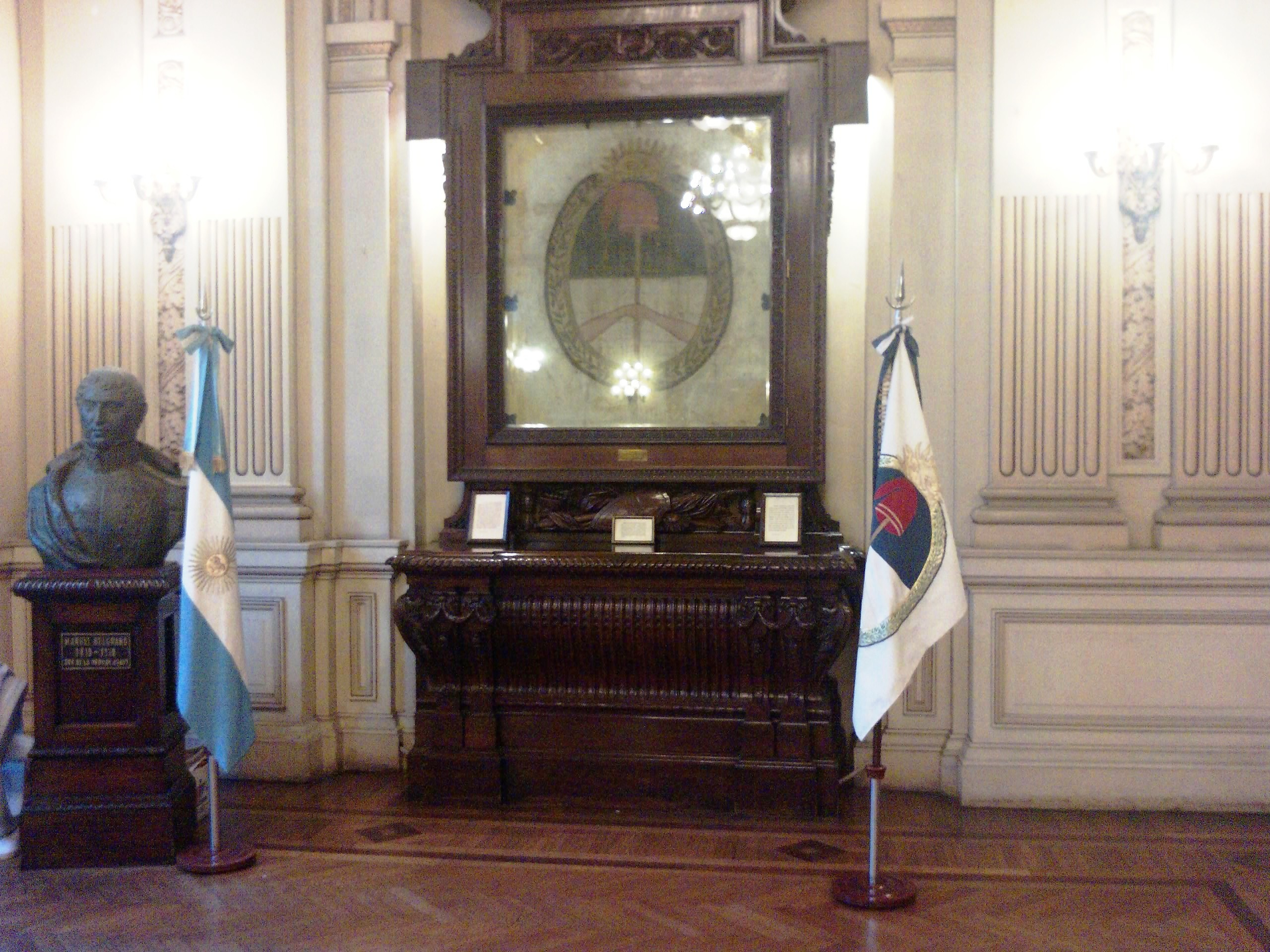 Bandera obsequiada por el Gral. Belgrano al Cabildo de Jujuy,despues de hacerla bendecir en la Iglesia Matriz el 25 de mayo de 1813.